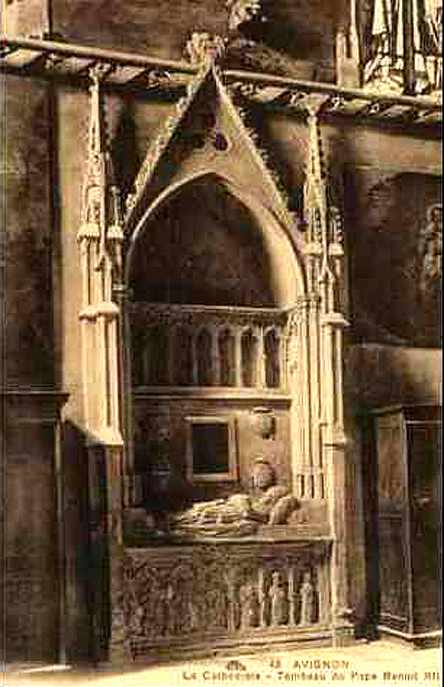 Tombeau de Benoît XII